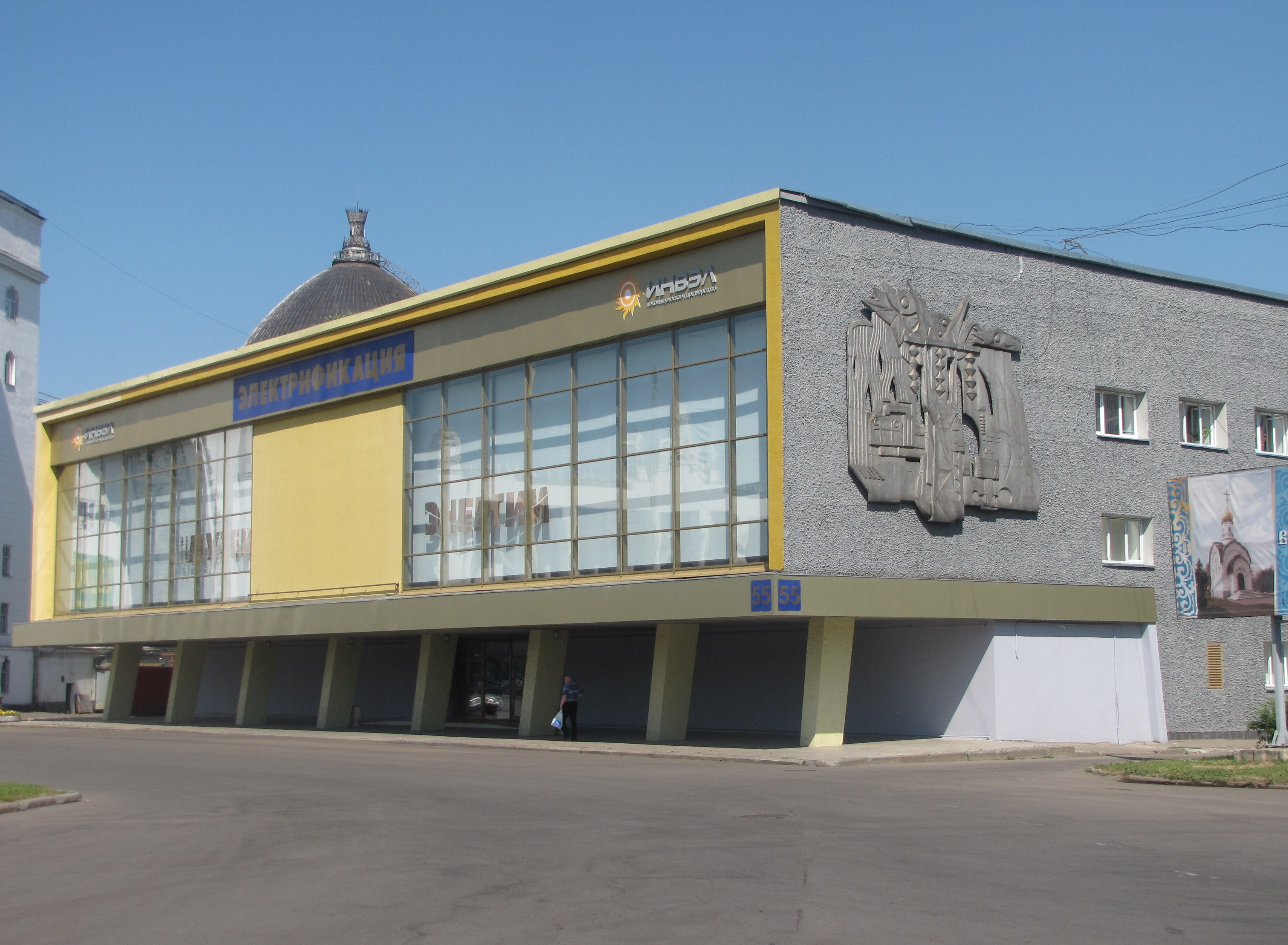 Павильон Электрификации относиться к передиоду раннего советского модернизма, и одним из самых удачных павильонов 1960-х на ВДНХ СССР